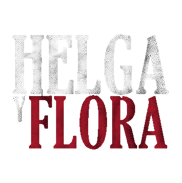 Logotipo de la serie chilena Helga y Flora de Canal 13 Chile.